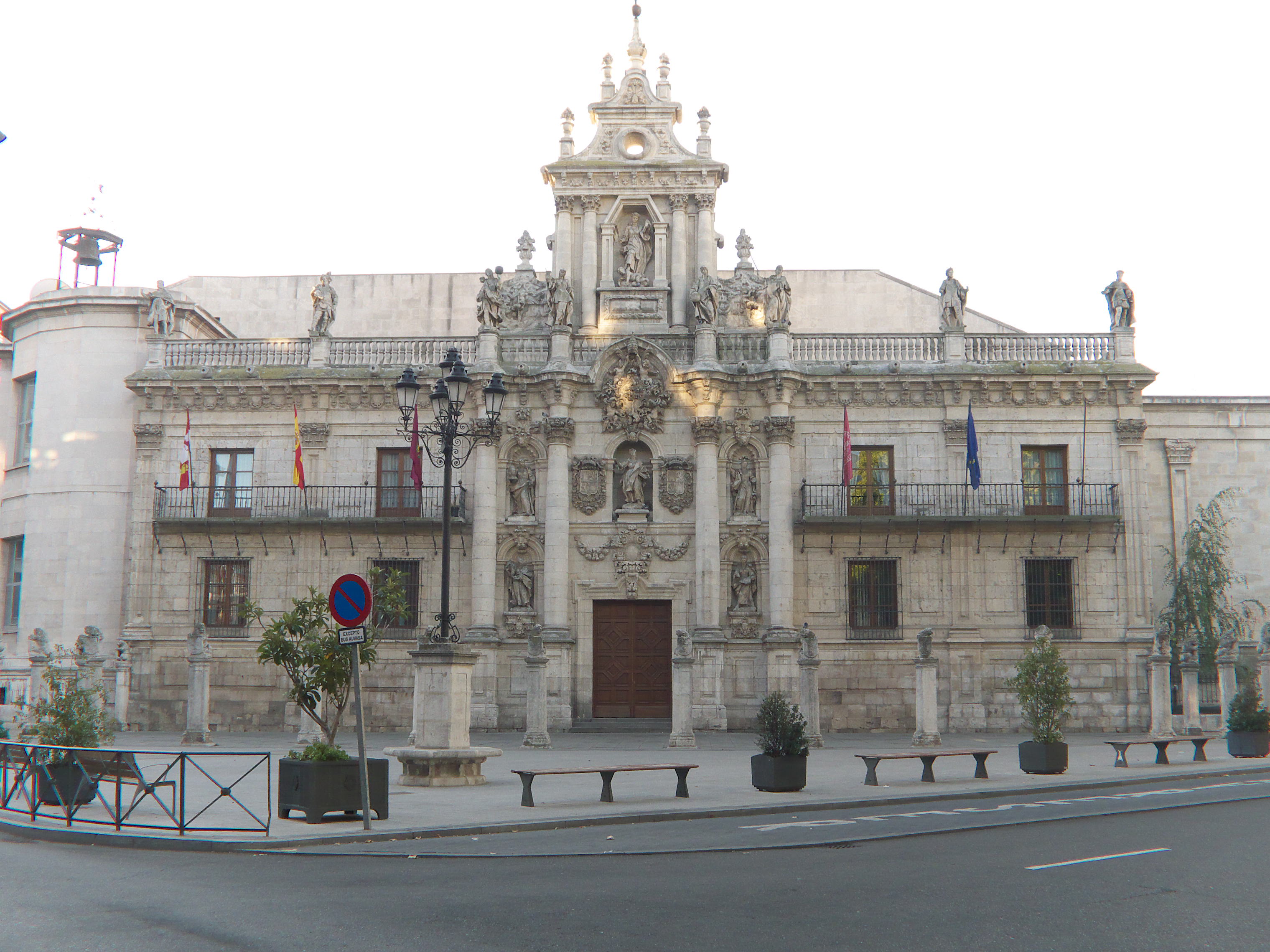 Una obra de fray Pedro de la Visitación (1715) con las esculturas de Antonio, Diego y Narciso Tomé.